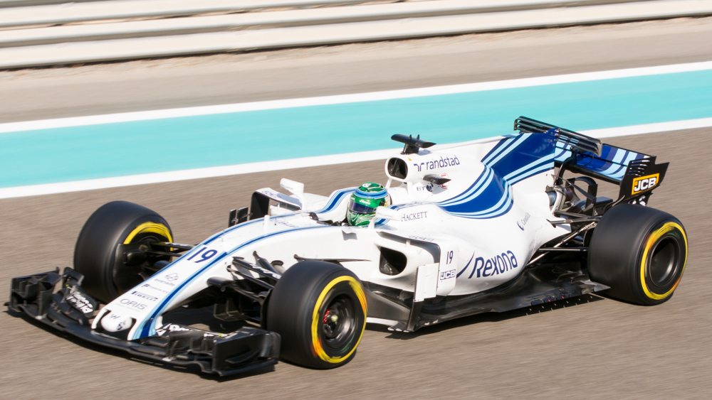 Felipe Massa at final F1 race weekend Abu Dhabi GP 2017